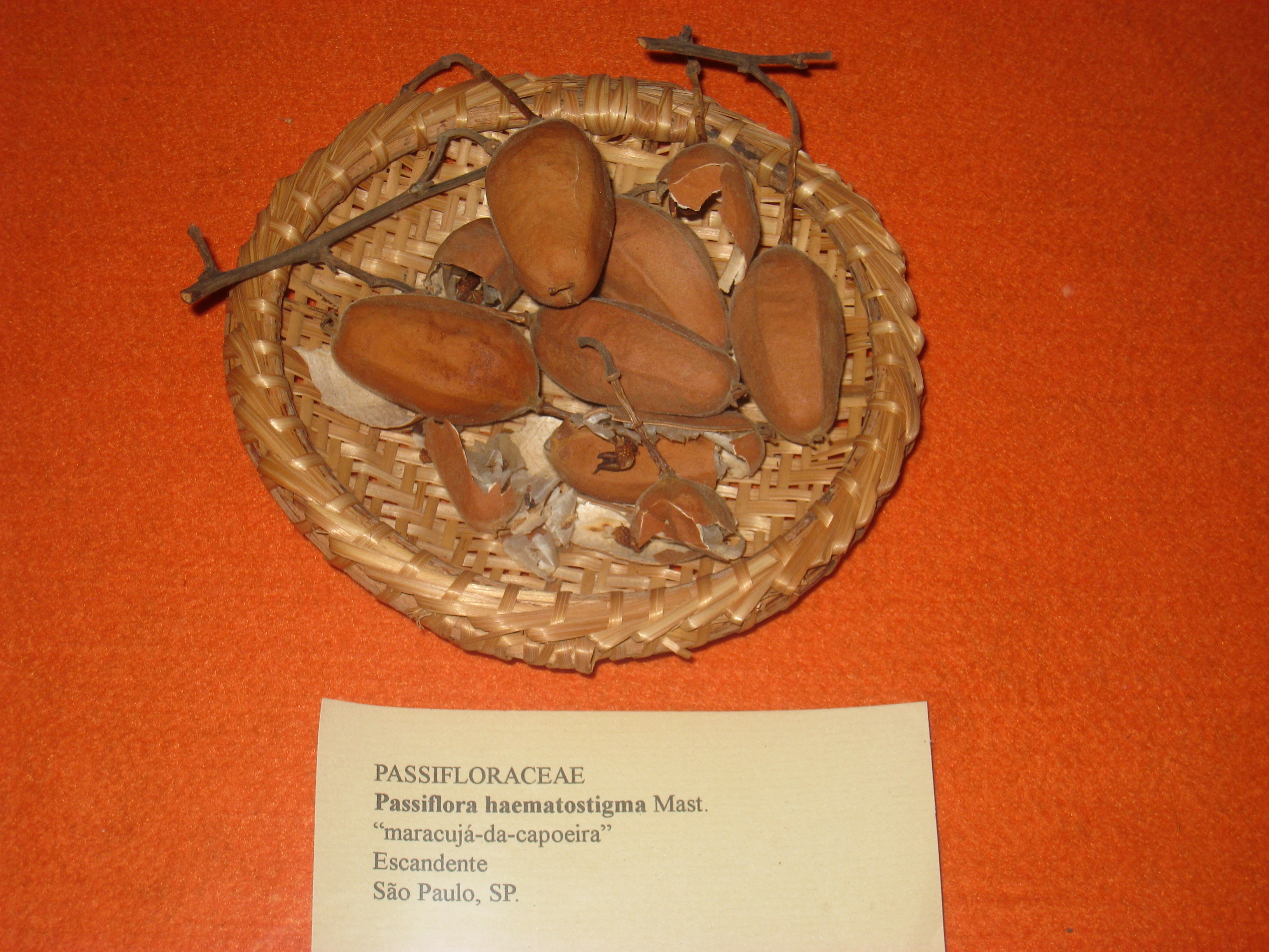 Passiflora haematostigma specimen in the Museu Botânico Dr. João Barbosa Rodrigues, Jardim Botânico de São Paulo, São Paulo City, SP, Brazil.